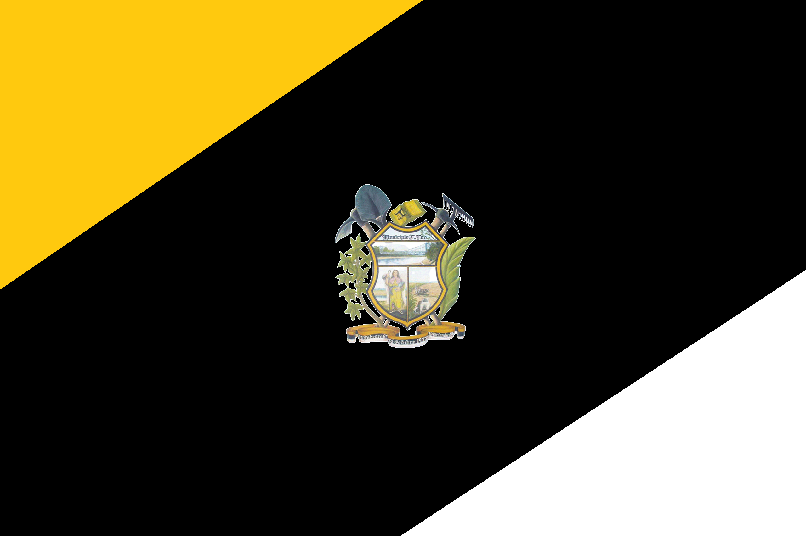 Bandera del municipio Fernández Feo, estado Táchira, Venezuela